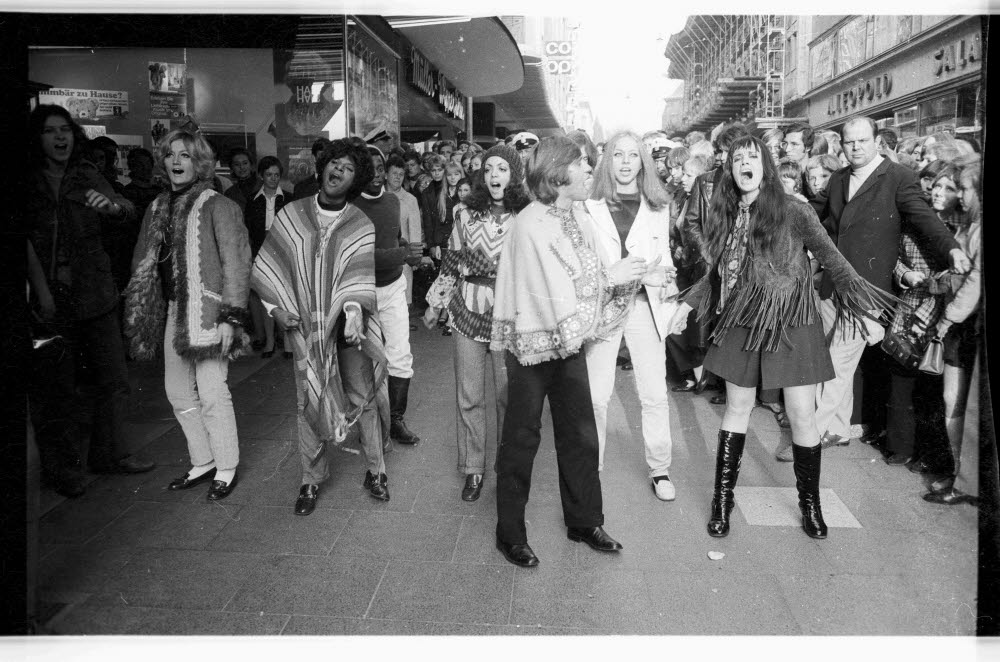 Darsteller der Hamburger Inszenierung vor dem Rundfunkgeschäft Kihr Goebel. Polizisten kontrollieren die Schaulustigen.